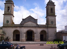 Frente de la parroquia, donde se ven claramente sus naves.